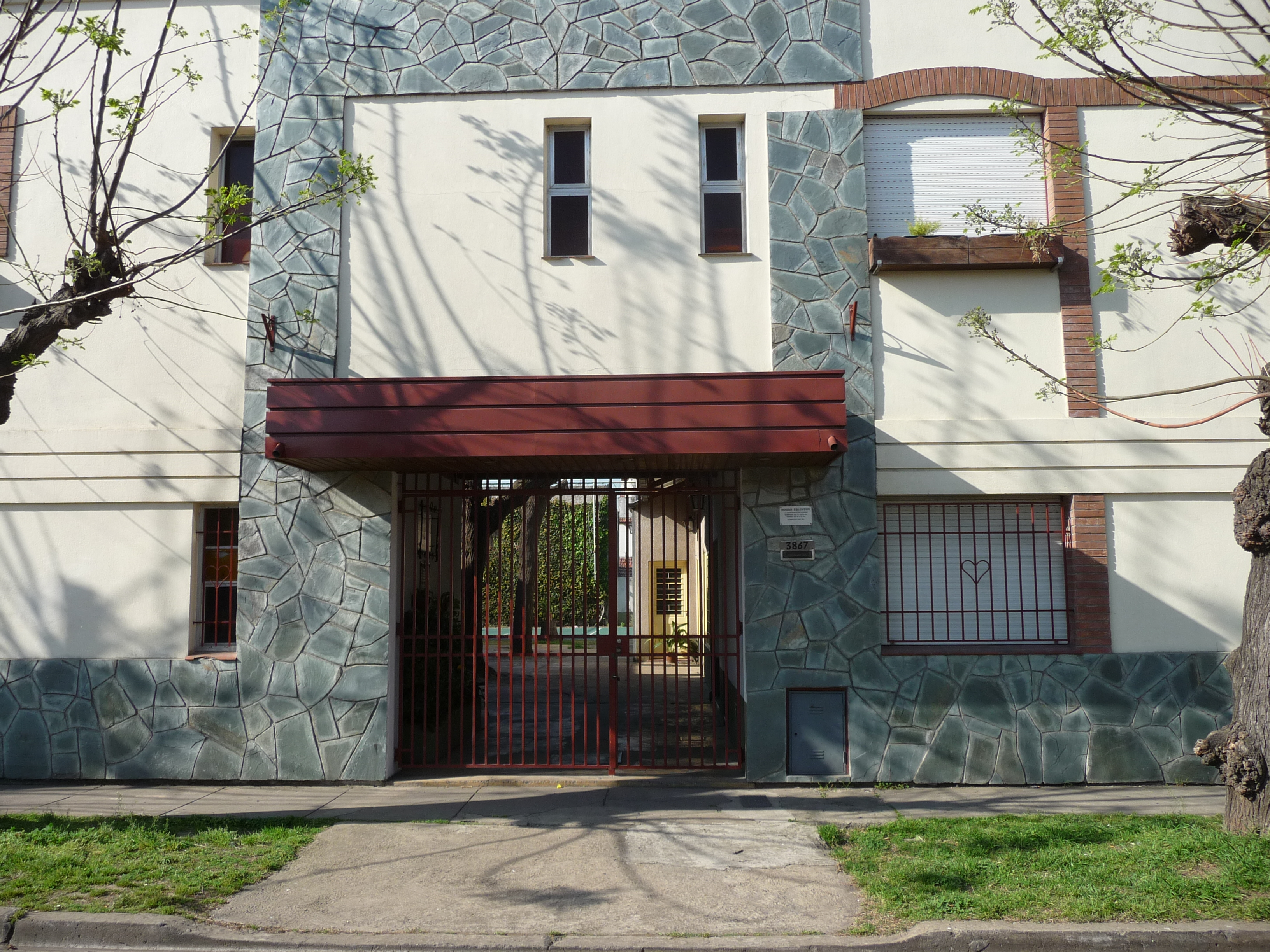 Eslovenos, inmigracion, Argentina, colectividades, Carapachay, Vicente Lopez